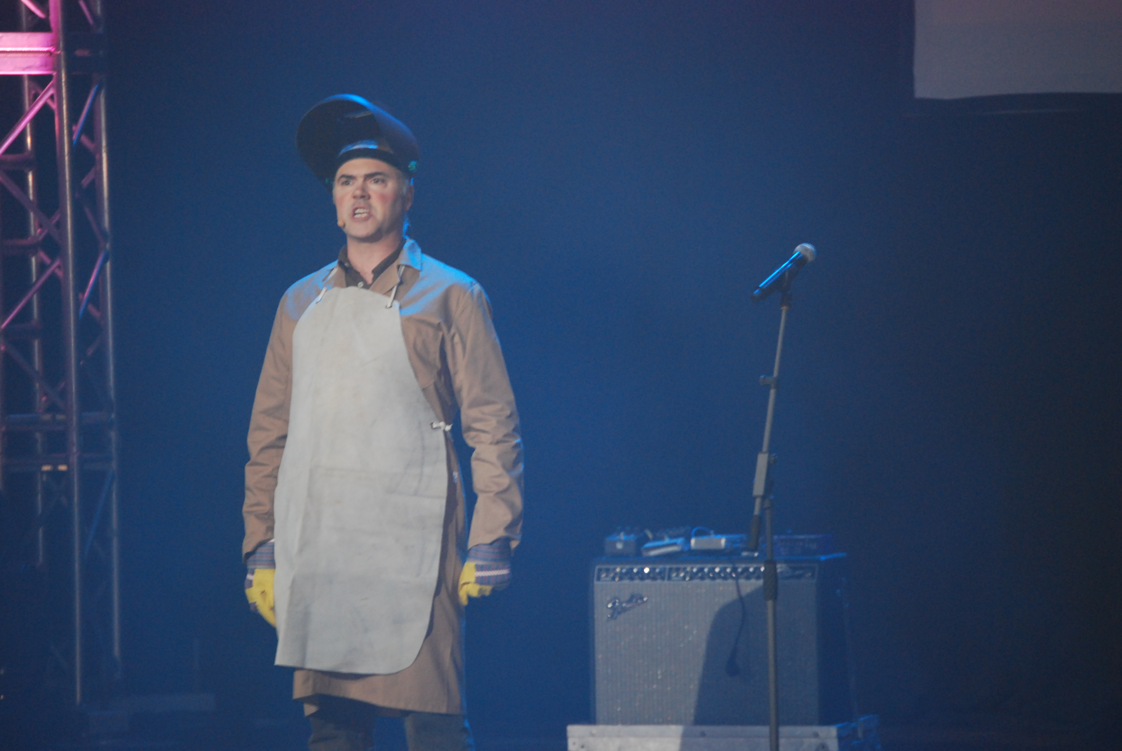 O grupo galego de teatro Chévere presentando o Music.gal.